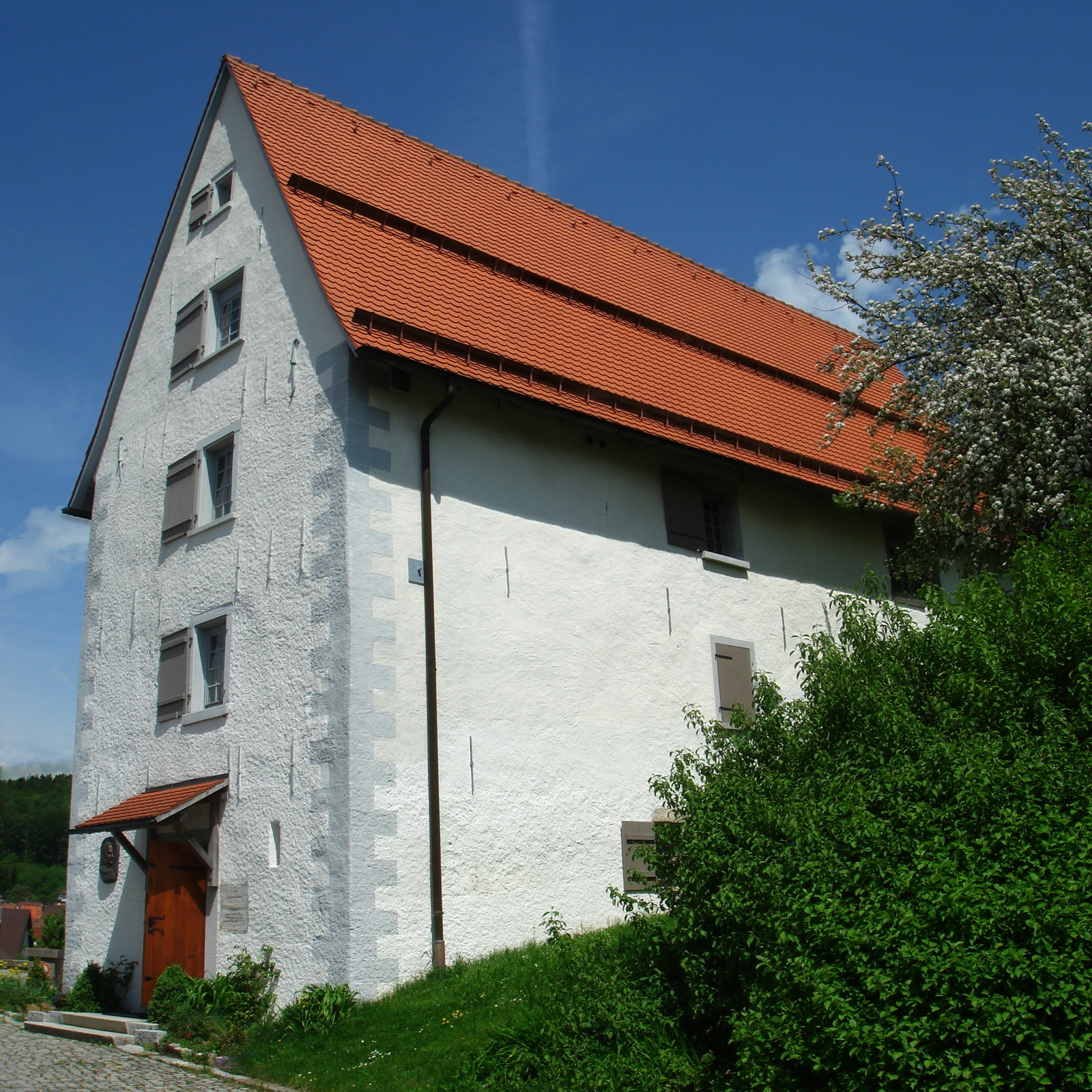 Philipp-Matthäus-Hahn-Museum im Kasten, Albstadt-Onstmettingen